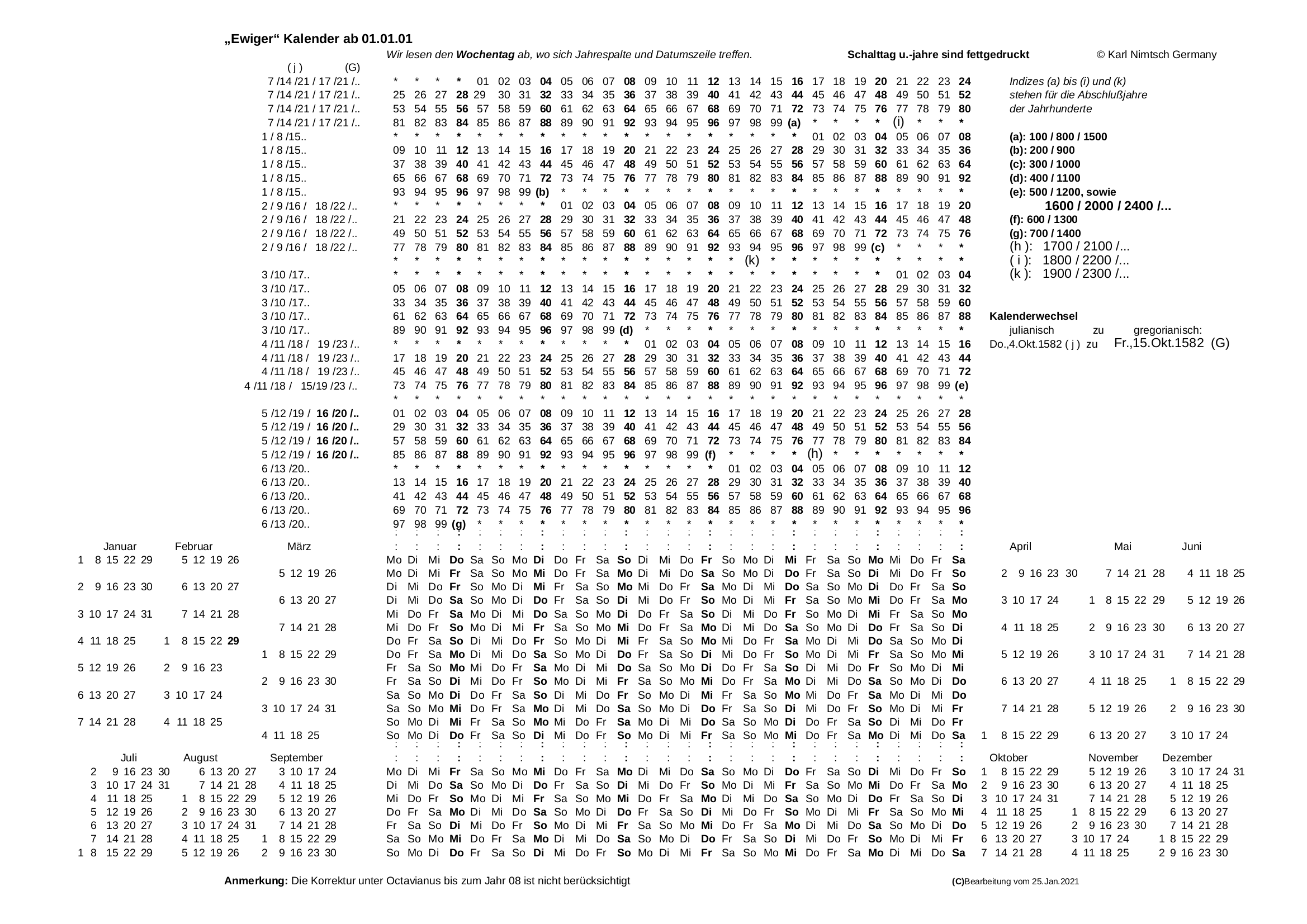 Kalender ab 1.Januar des Jahres 1 n.Chr. julian. und gregorianisch